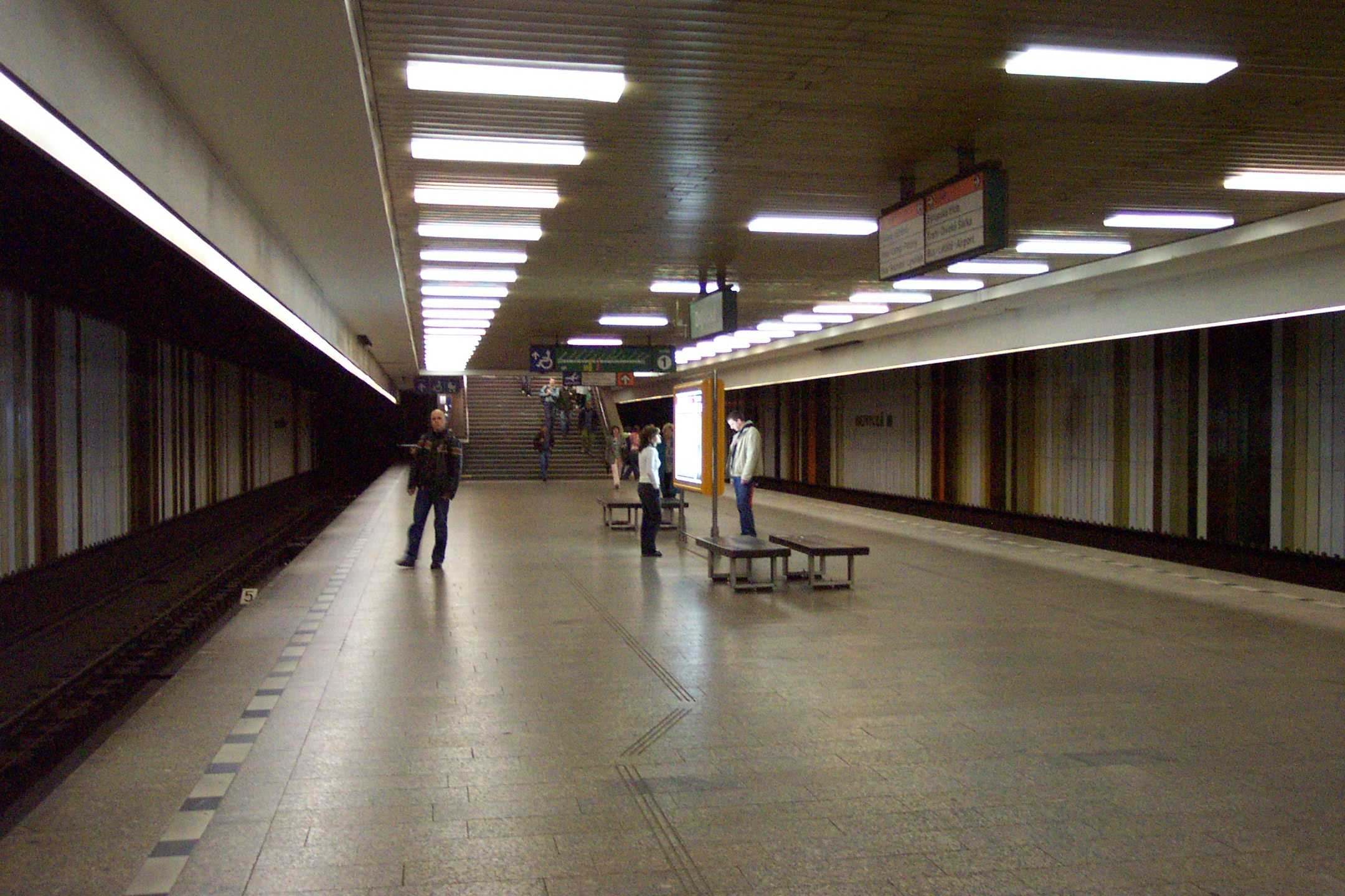 Metro station Dejvická - stanice metra Dejvická